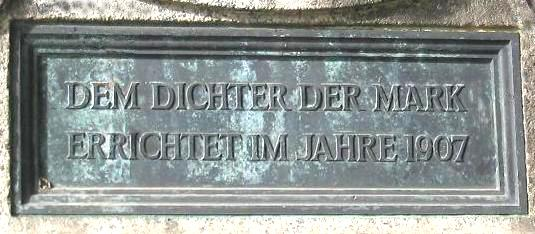 Fontane Denkmal, Neuruppin, Inschrift